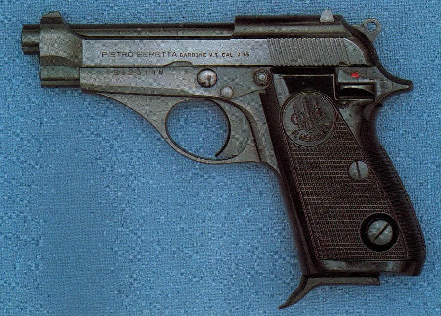 Pistola Beretta mod. 70 - Beretta Serie 70